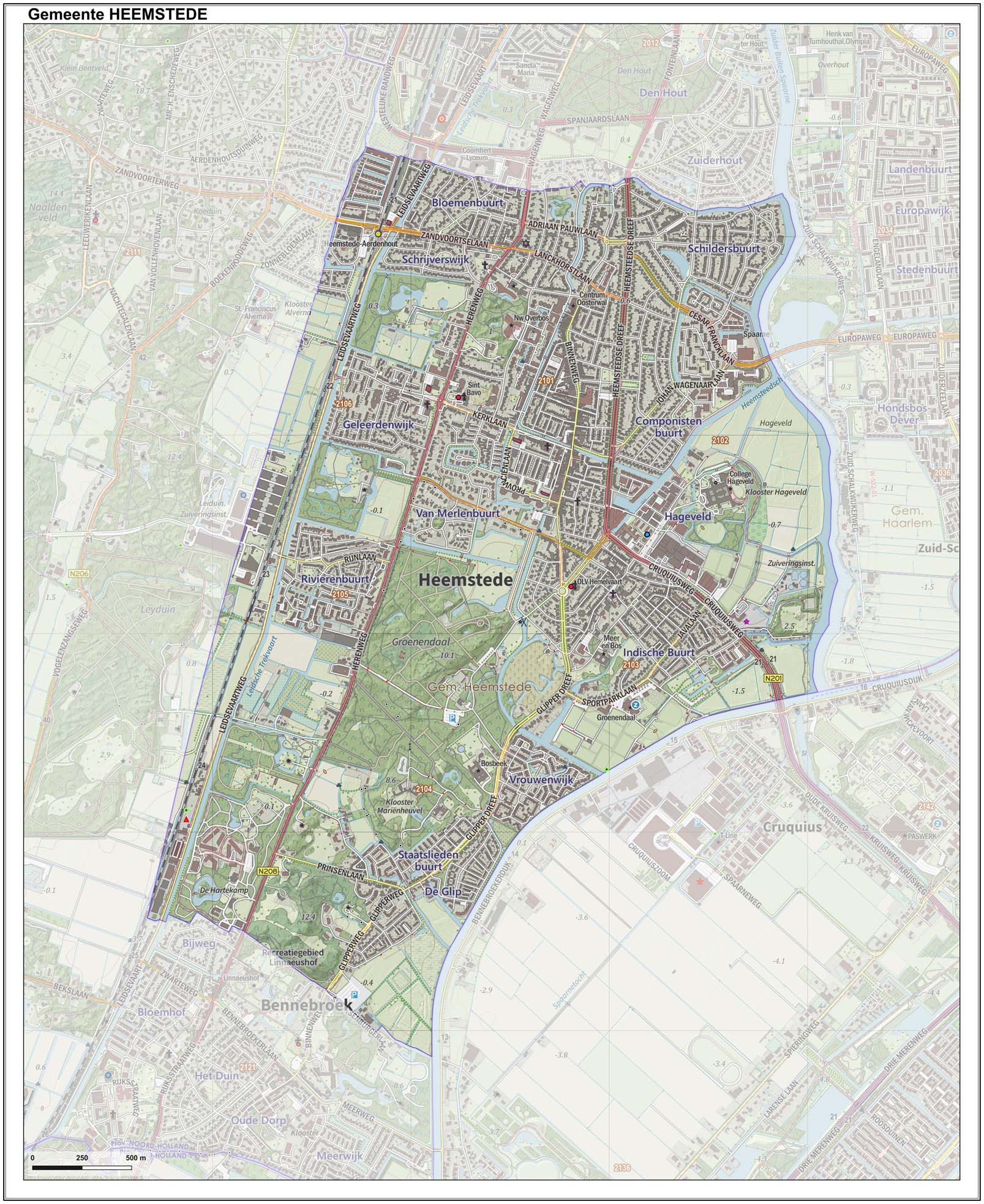 Topografische gemeentekaart. Resolutie: 400 pixels/km. Kaartbeeld samengesteld uit de open geodata van de Top10NL en Top25namen (Kadaster), Creative Commons-BY licentie. Gebouwvlakken uit open geodata BAG extract. Wegen uit de OpenStreetMap, OpenStreetMap community. Reliëfschaduw uit de Actuele Hoogtekaart AHN2. Samenstelling en kleurenschema: Jan-Willem van Aalst, met QGIS. Zie ook de Legenda.